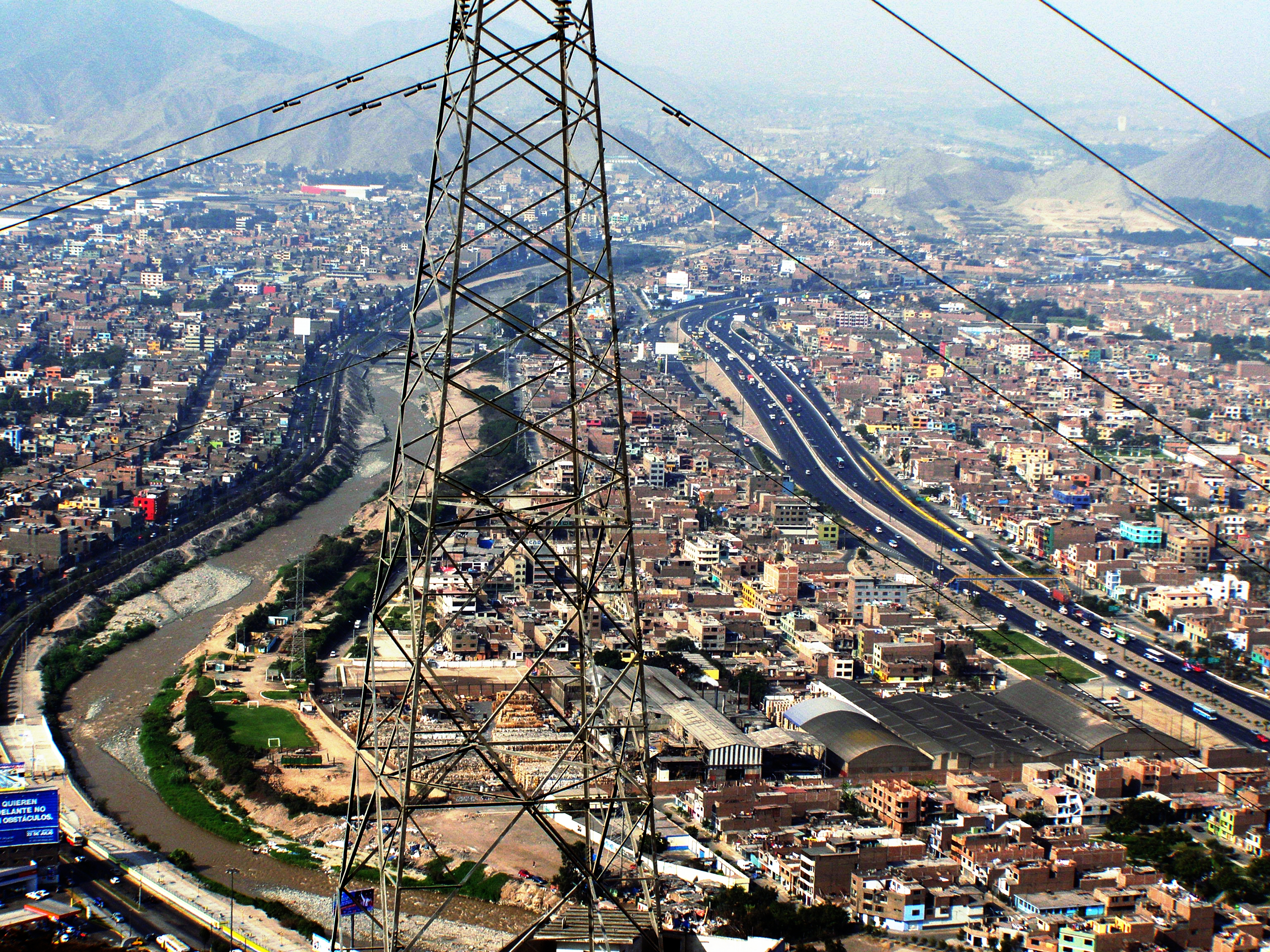 Lima, Perú